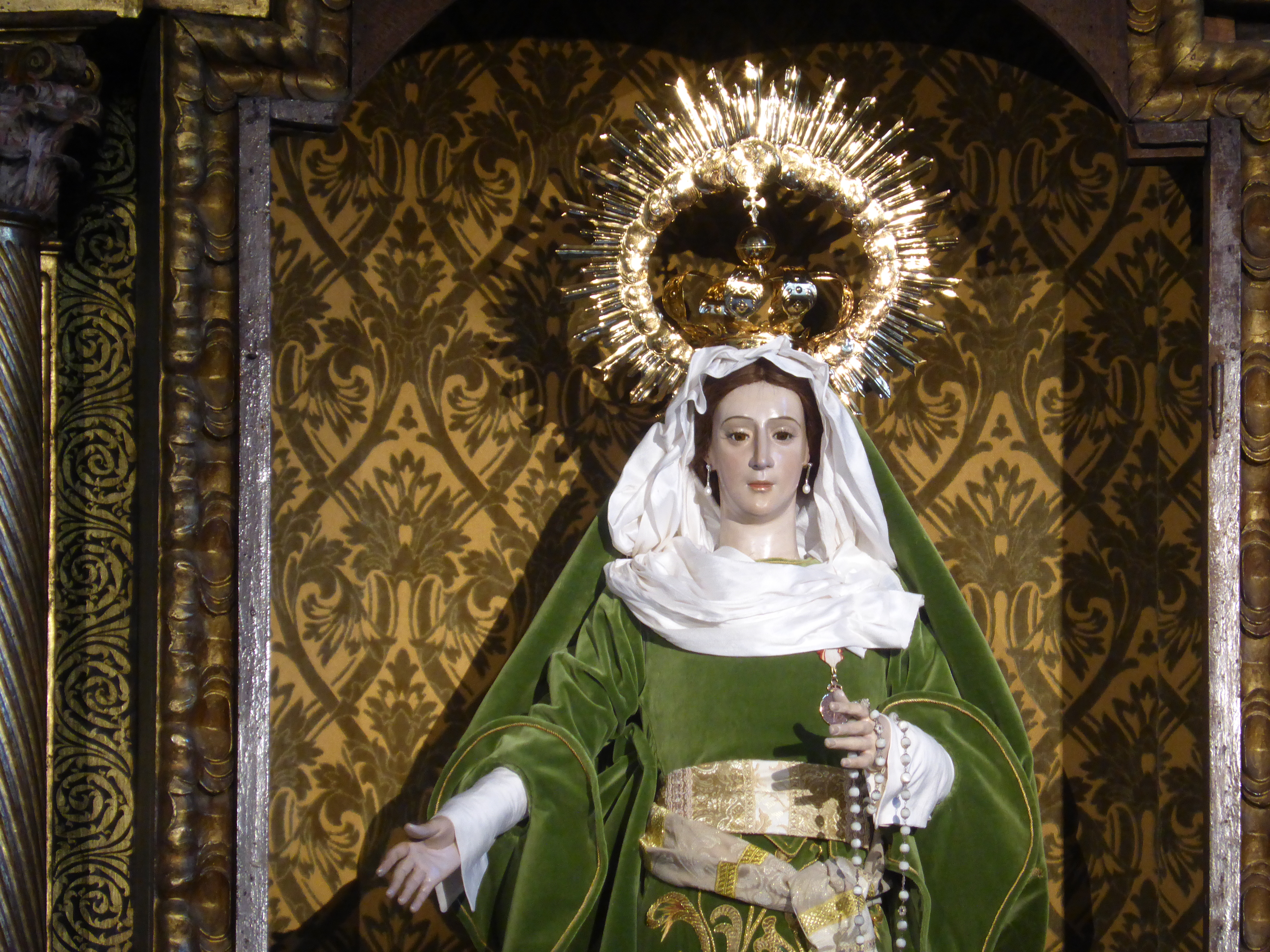 Imagen del siglo XVIII. Cofradía de Nuestra Señora de la Esperanza, o Cofradía de la Balesquida.